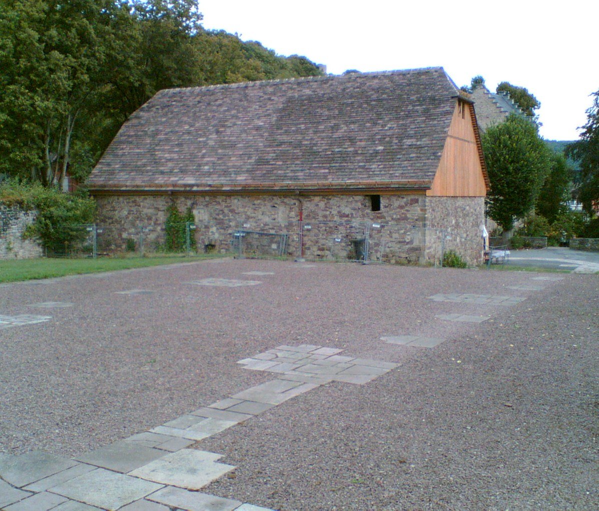 Die Zehntscheune in Helmarshausen am Tag des offenen Denkmals 2013. An diesem Tag wurde das Gebäude anläßlich der zuvor erfolgten Renovierung des Daches mittels eines Gottesdienstes zur weiteren Nutzung eingeweiht. Die Steinplatten im Vordergrund auf der Kiesfläche markieren den Standort der ehemaligen Klosterkirche.